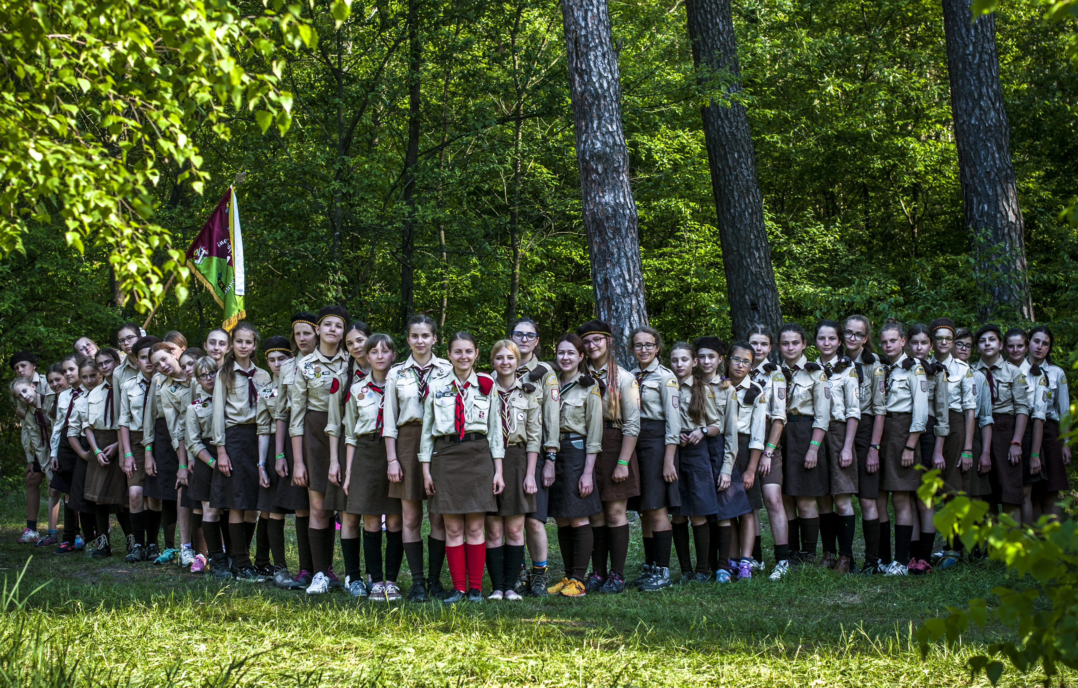 Курінь число 46 імені Марусі Богуславки на Свято Весни 2019